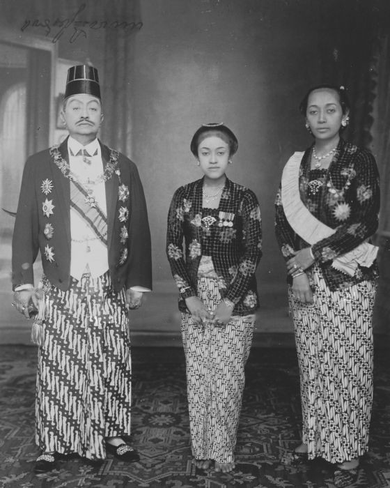 foto. Portret van Pakoe Boewono X, Susuhunan van Solo, met echtgenote en dochter in Soerakarta